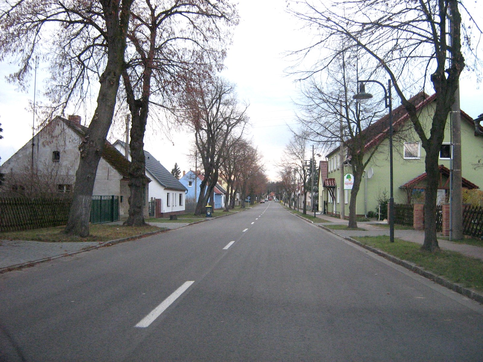 Dorfstrasse in Krausnick, einem Dorf in der Gemeinde Krausnick-Groß Wasserburg, Landkreis Dahme-Spreewald, Brandenburg.